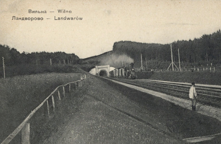 Панарский тоннель на перегоне Вильна - Ландварово. Открытое письмо. До 1915 г.